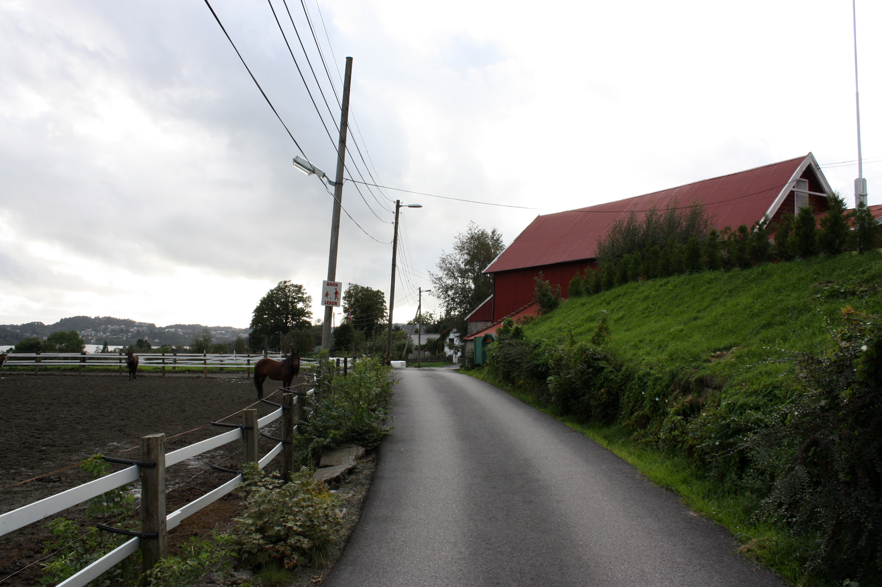 Frants Beyers veg, Fana, Bergen.